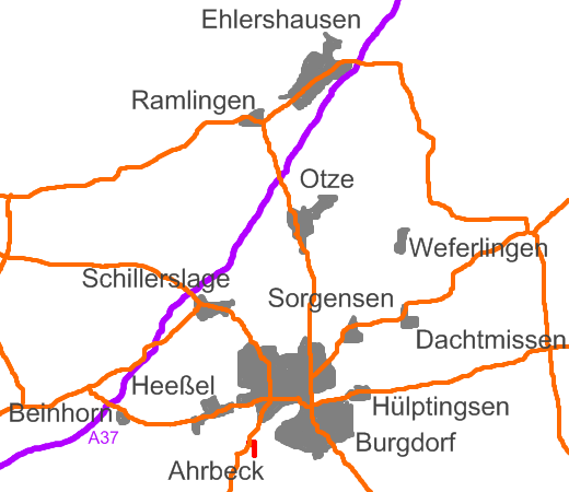 Lage von Ahrbeck als Ortsteil von Burgdorf